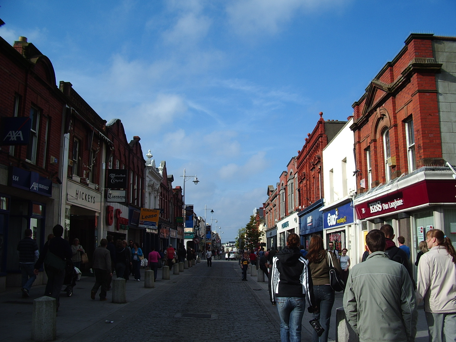 Dun Laoghaire